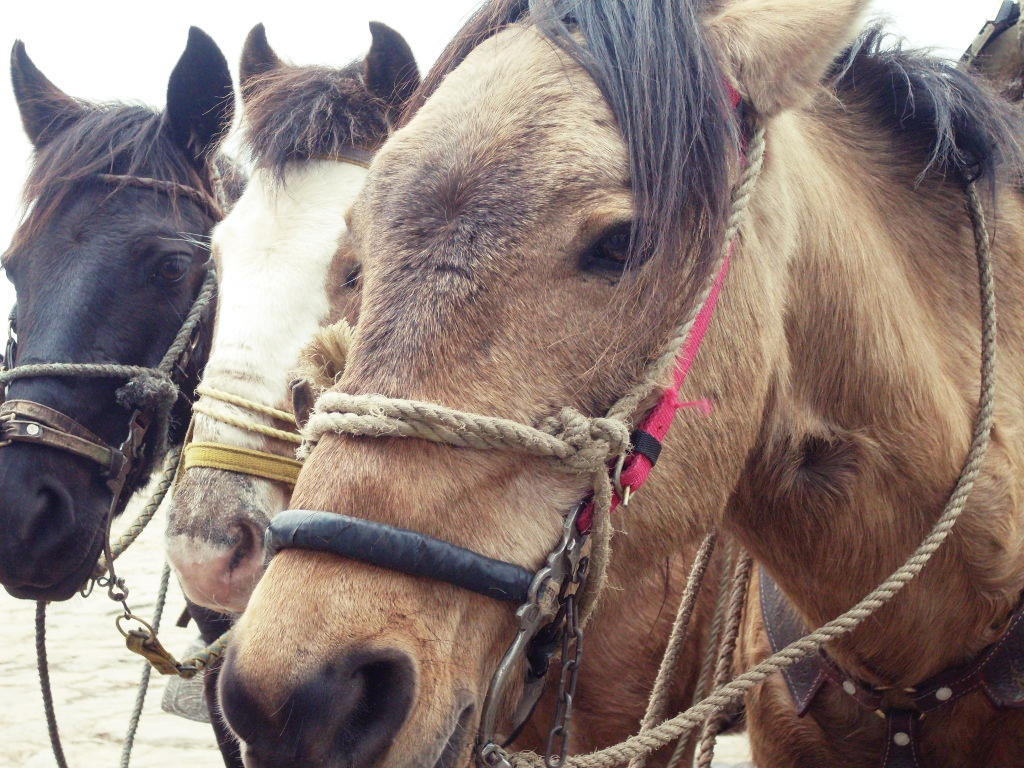 Caballos en Mucubají, Mérida, Venezuela.